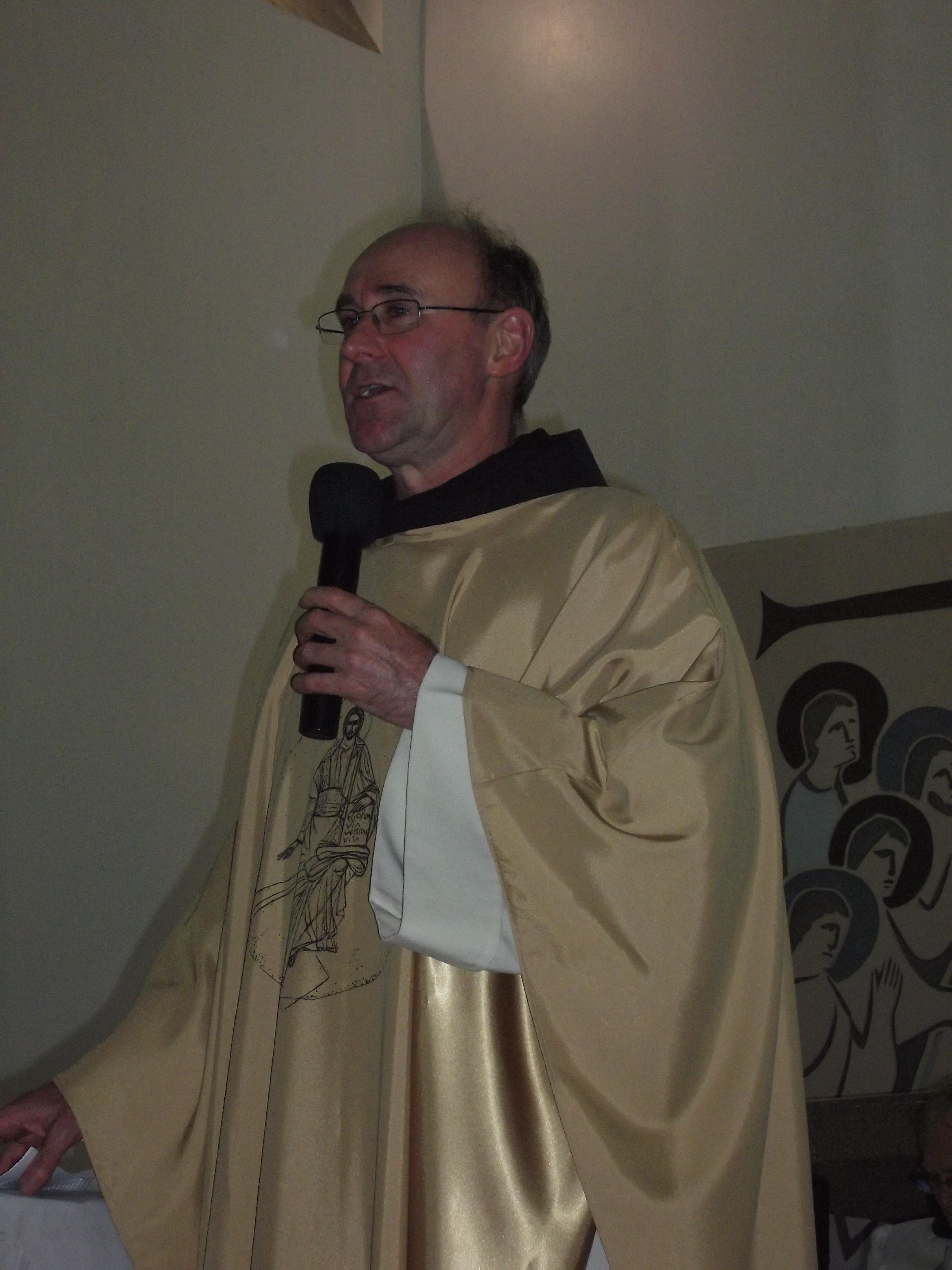 João Inácio Müller, OFM, ministro da Província São Francisco de Assis, Rio Grande do Sul, Brasil